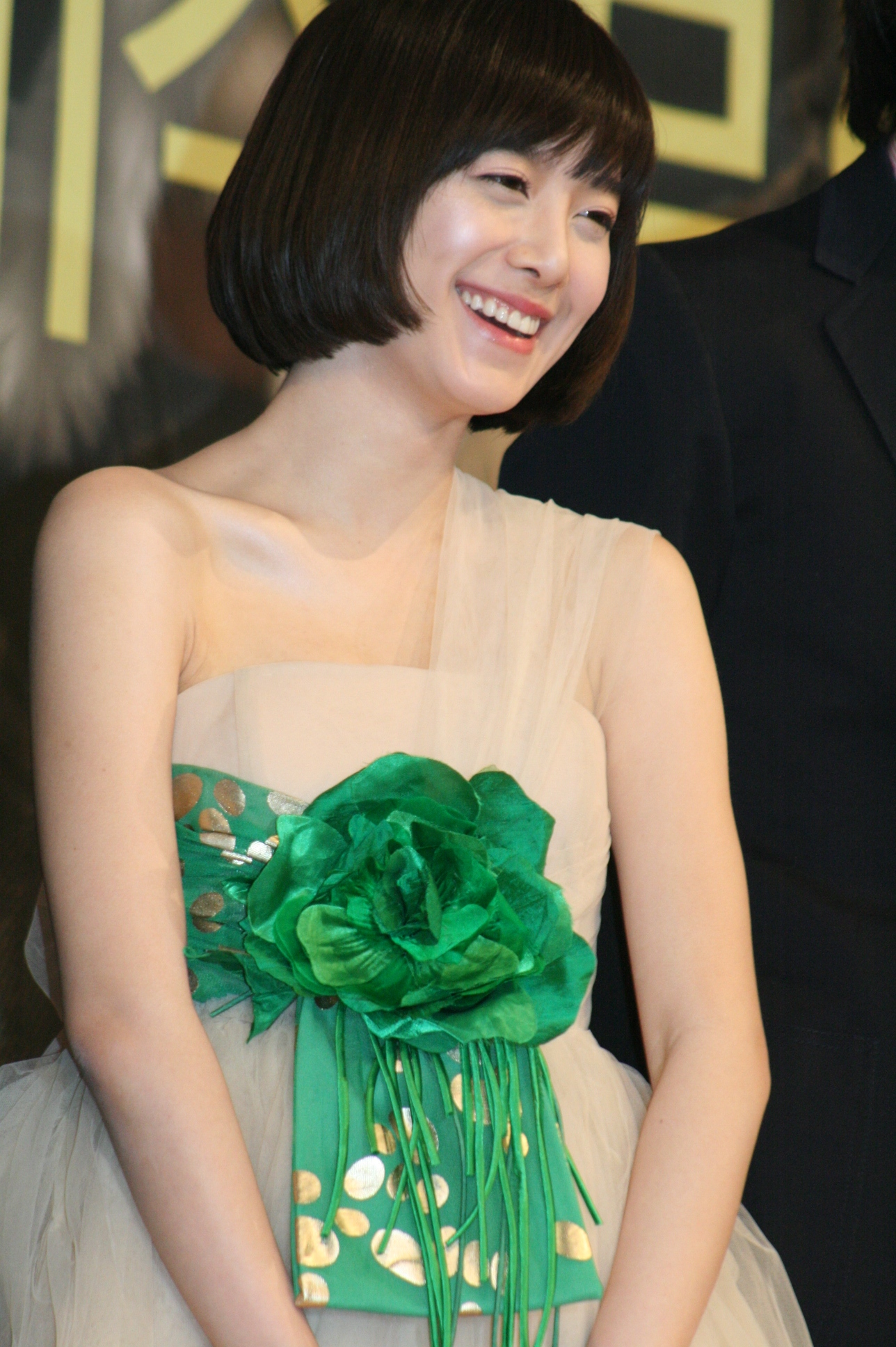 2008년 12월 22일 서울 롯데호텔에서 열린 《꽃보다 남자》 제작발표회에서의 구혜선.